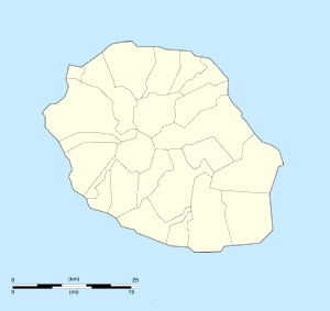 Carte de l'île de la Réunion, terrritoire français dans l'Océan Indien. La carte représente le découpage administratif des communes de l'île. Cette carte est un montage fait à partir d'une image sur commons